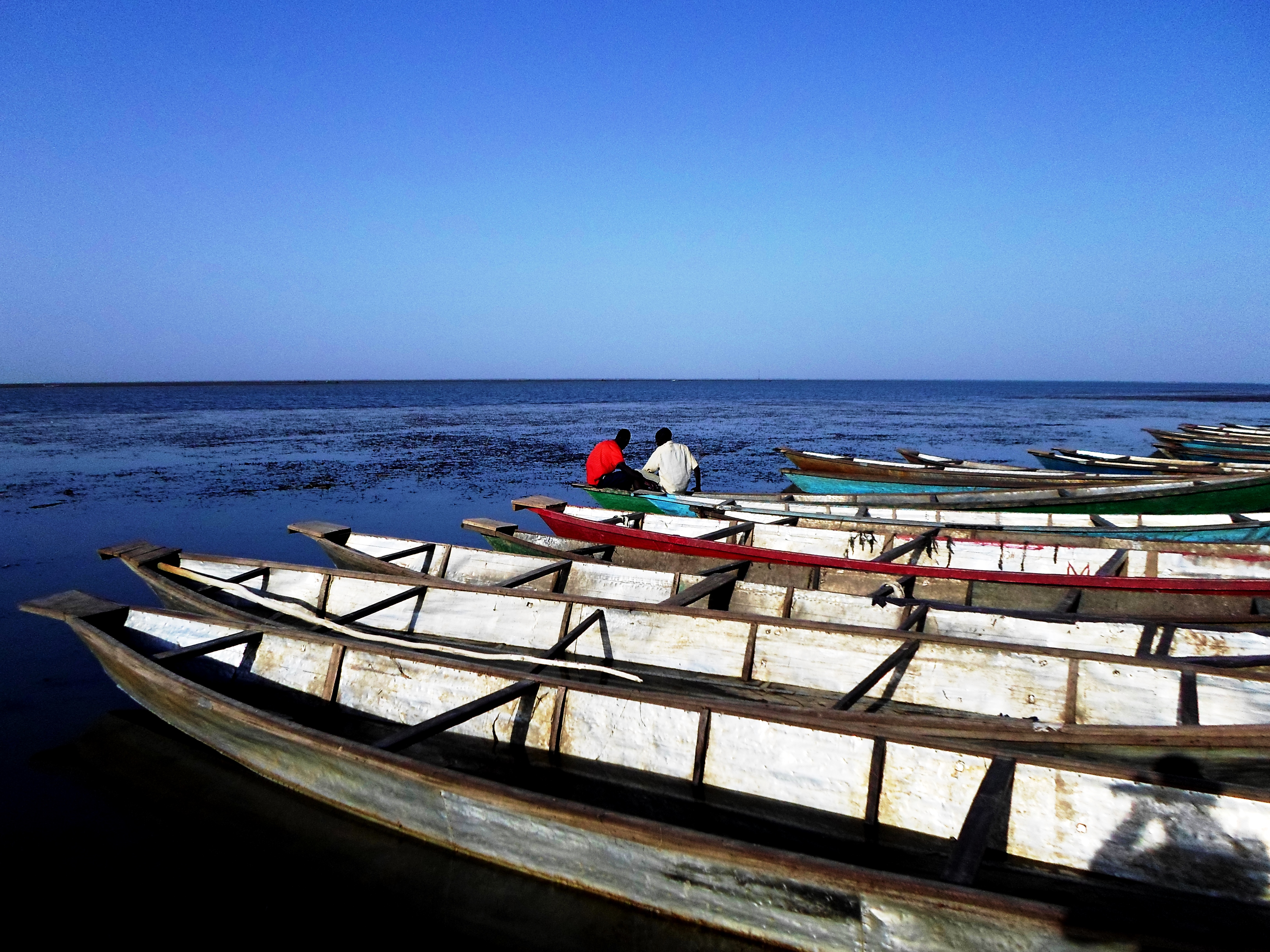 Vues du lac de Maga Localisation : Mayo-Danay, Extrême-Nord